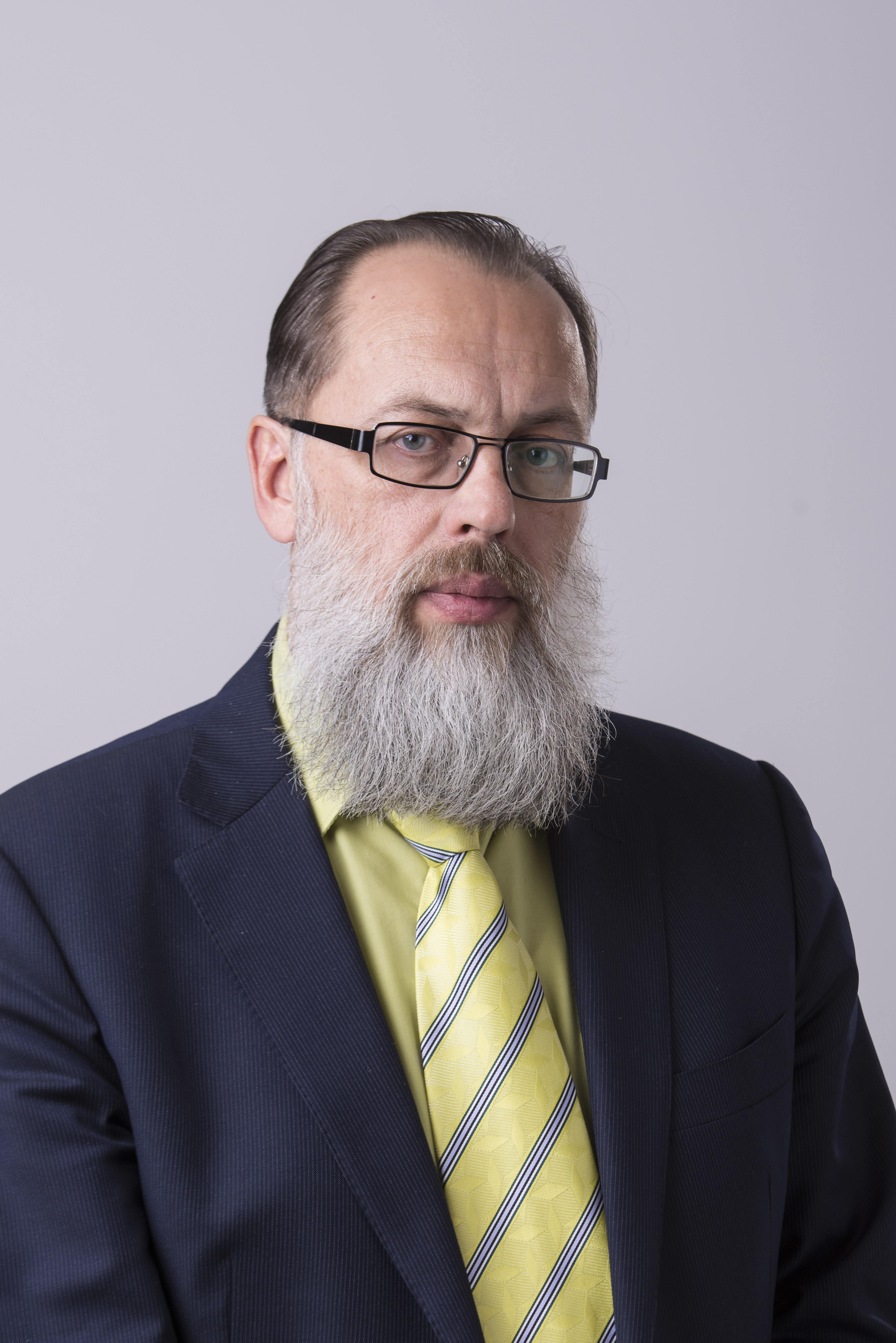 2014.gada 9.decembris. 12.Saeimas deputāts Vladimirs Nikonovs. Foto: Reinis Inkēns, Saeimas Kanceleja Izmantošanas noteikumi: saeima.lv/lv/autortiesibas